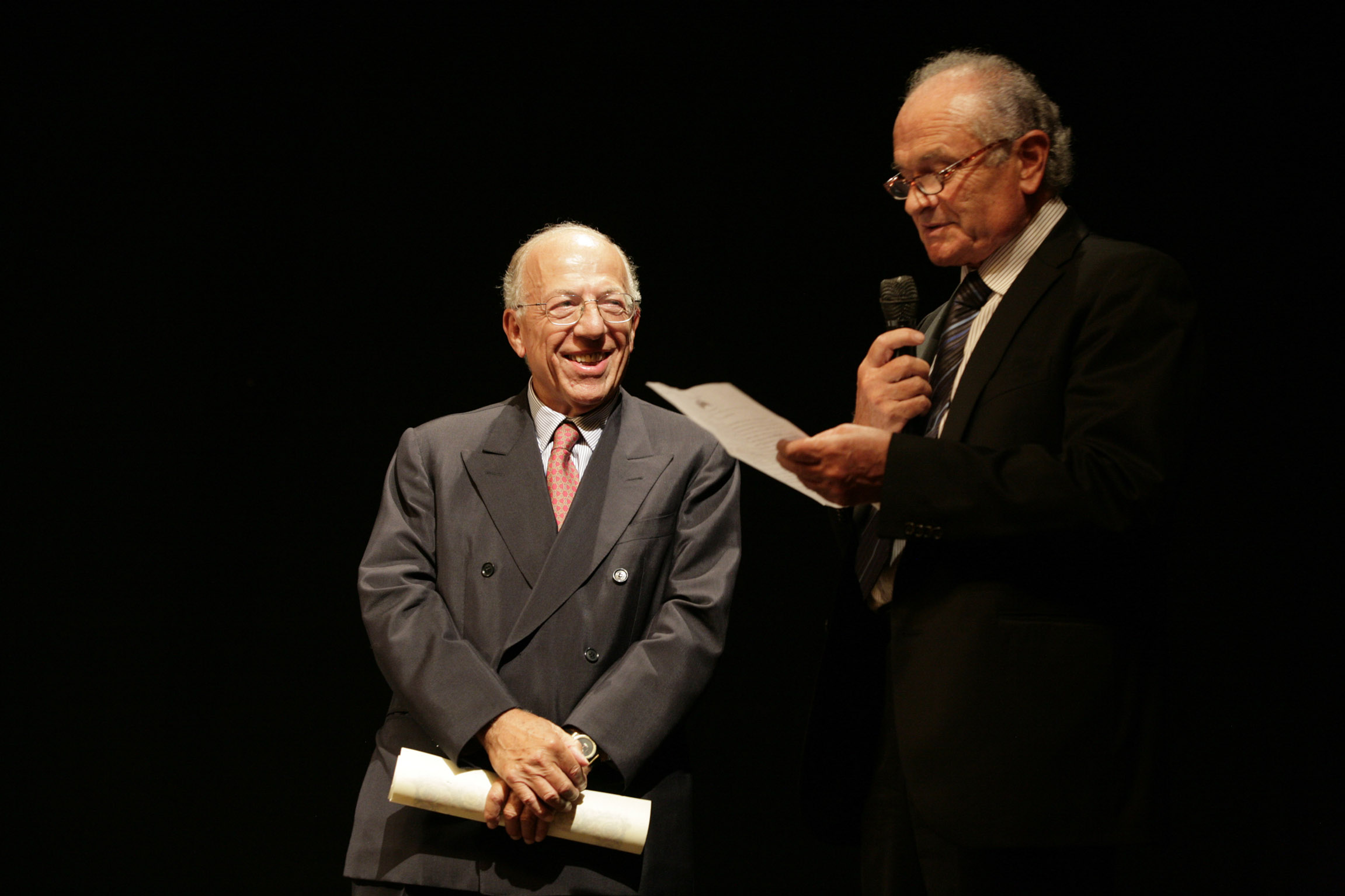 Milano - Maratona Pianistica. Franco Sala consegna a Fedele Confalonieri il diploma. Photo by ©Lelli e Masotti